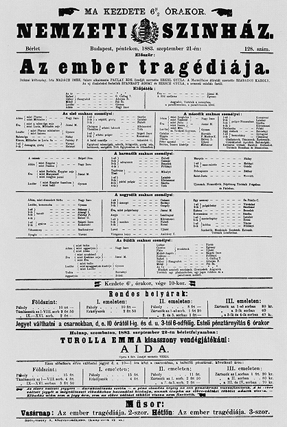 Az ember tragédiája ősbemutatójának plakátja.